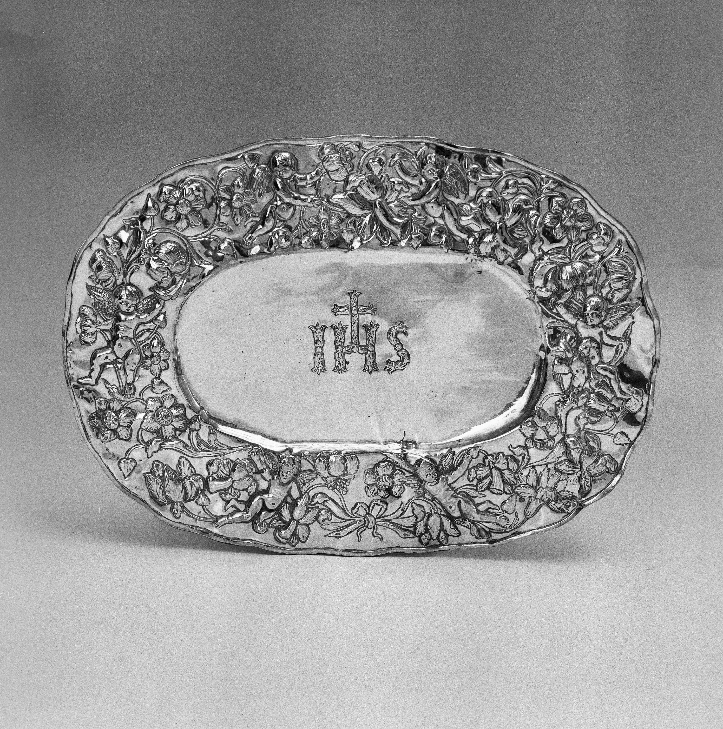 Rooms-katholieke Sint-Bonifatiuskerk: Zilveren ampullenblad, Sybertus Kaen, 1684 (opmerking: Gefotografeerd voor Het Monumentale Hart van Holland)